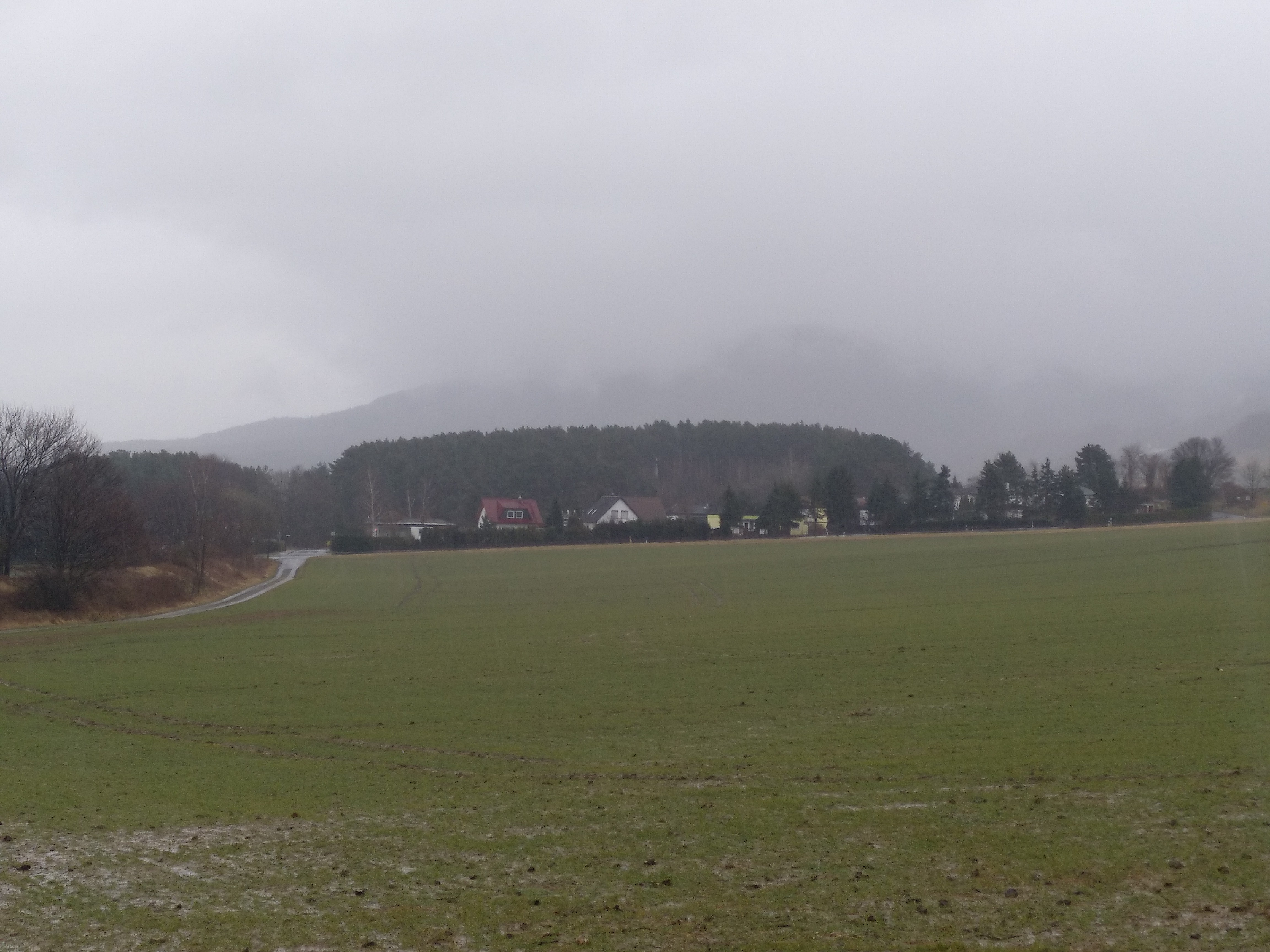 Die Quellesiedlung bei Westerode/Bad Harzburg im Landkreis Goslar, Niedersachsen, Westperspektive